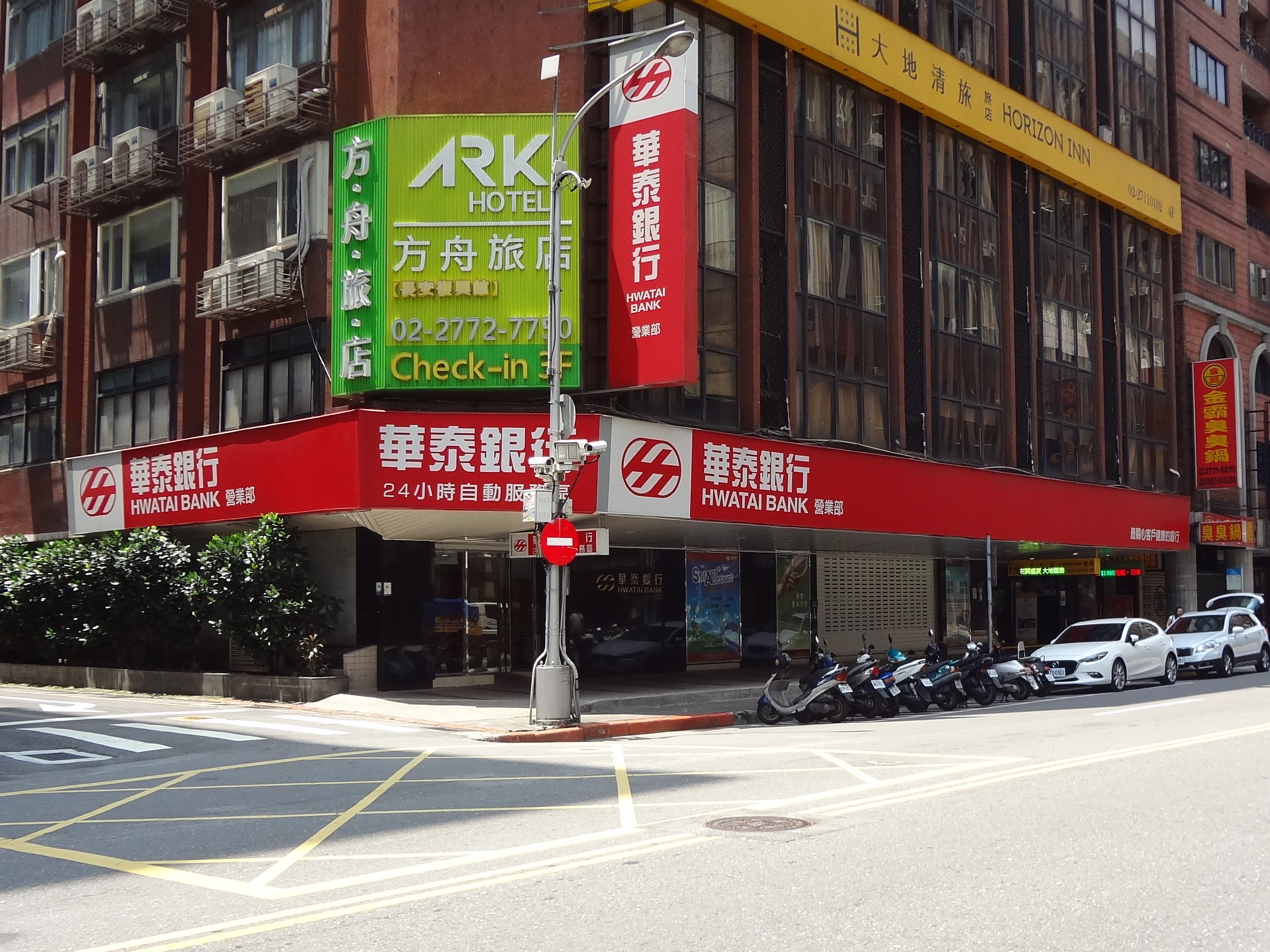 華泰商業銀行營業部，位於臺北市中山區長安東路二段246號1樓。